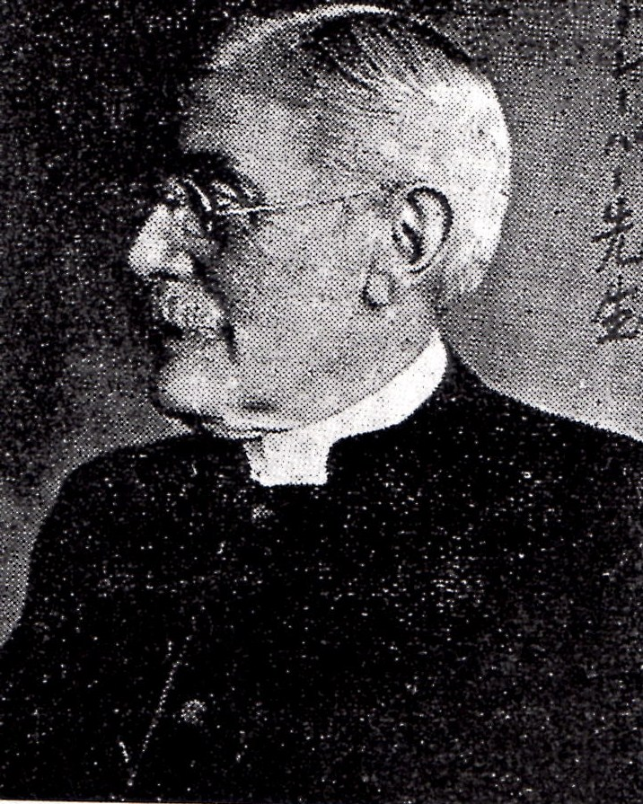 ギデオン・ドレーパーの横顔